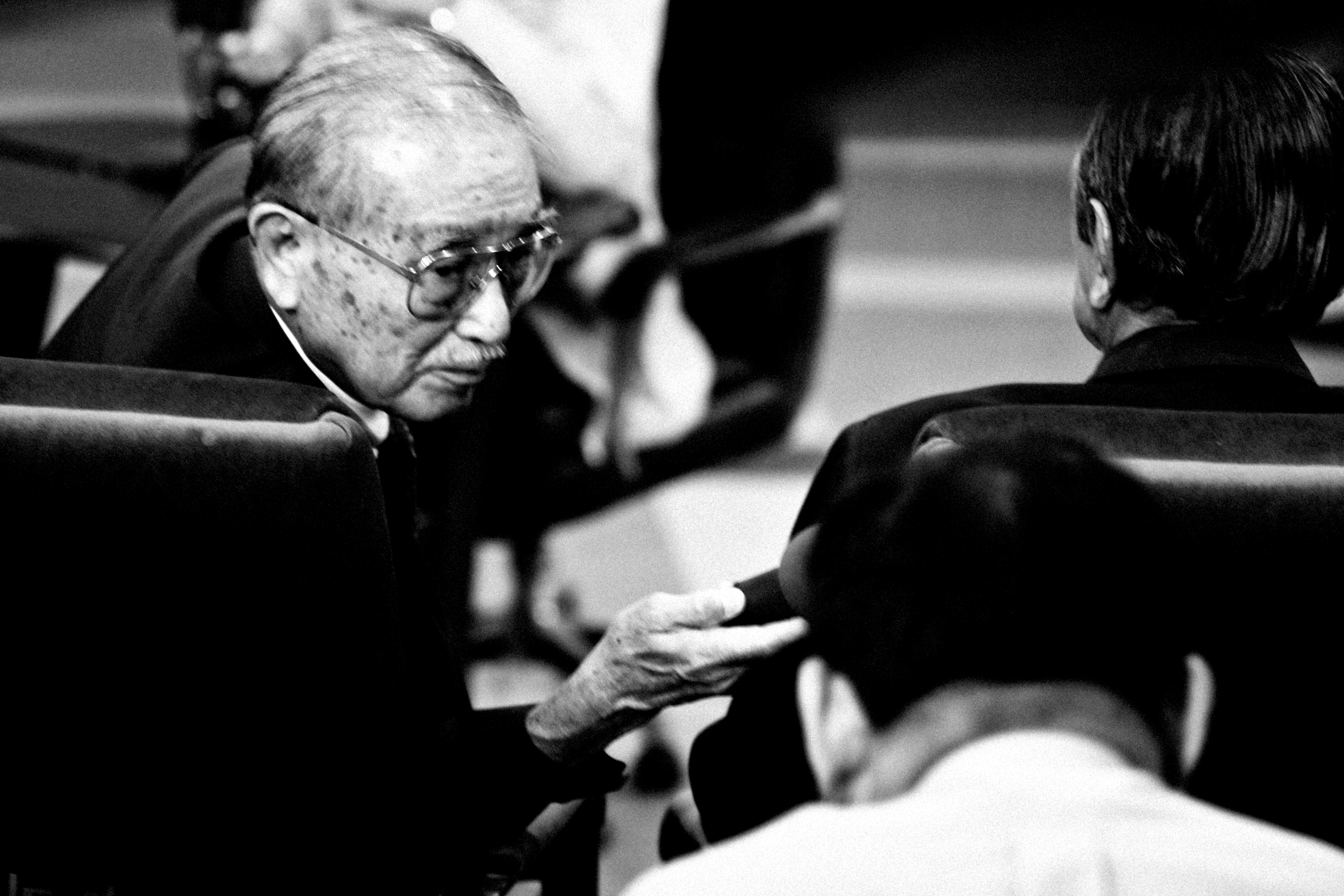 ประสาน ศิลป์จารุ / นายกรัฐมนตรี บันทึกรายการเชื่อมั่นประเทศไทยกับนายกฯ อภิสิทธิ์ "คุยข่าวกับ คนข่าววิทยุ" ณ อาคารกรมประชาสัมพันธ์ สถานีวิทยุโทรทัศน์แห่งประเทศไทย 20 กุมภาพันธ์ 2553 (The Official Site of The Prime Minister of Thailand Photo by พีรพัฒน์ วิมลรังครัตน์)